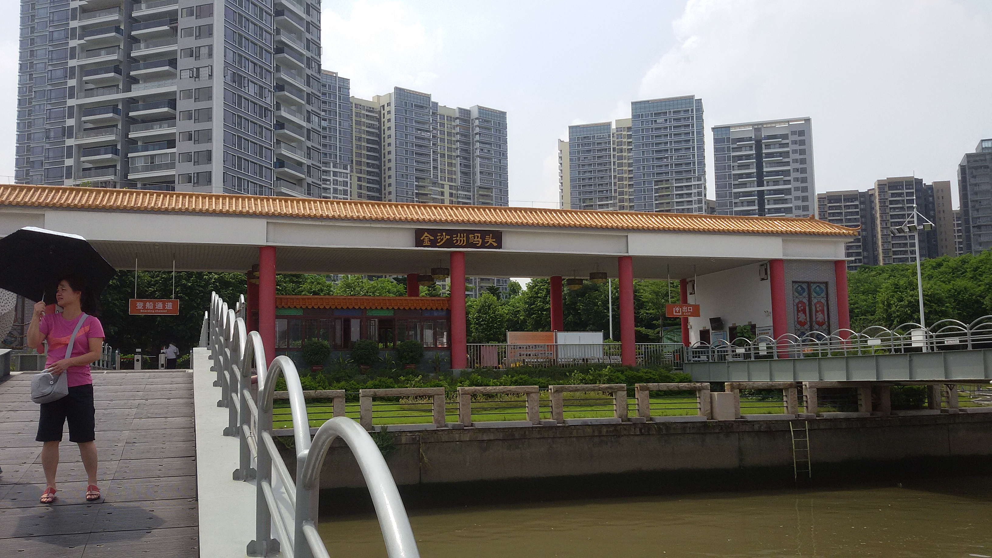 粵語: 金沙洲碼頭